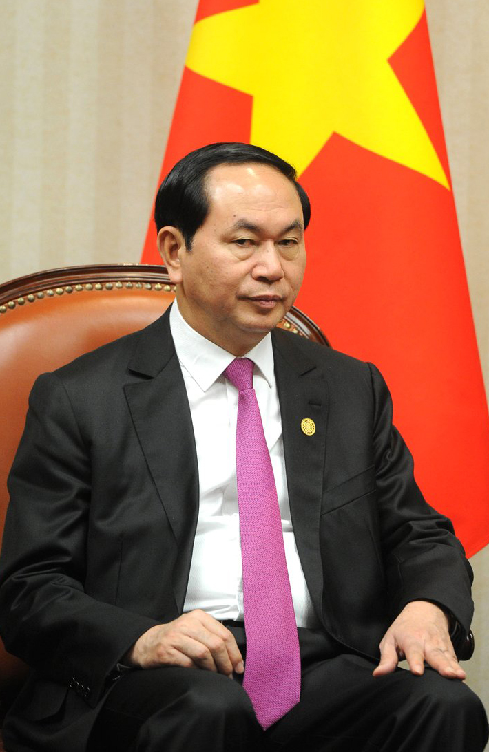 Президент Социалистической Республики Вьетнам Чан Дай Куанг во время встречи с Президентом России Владимиром Путиным